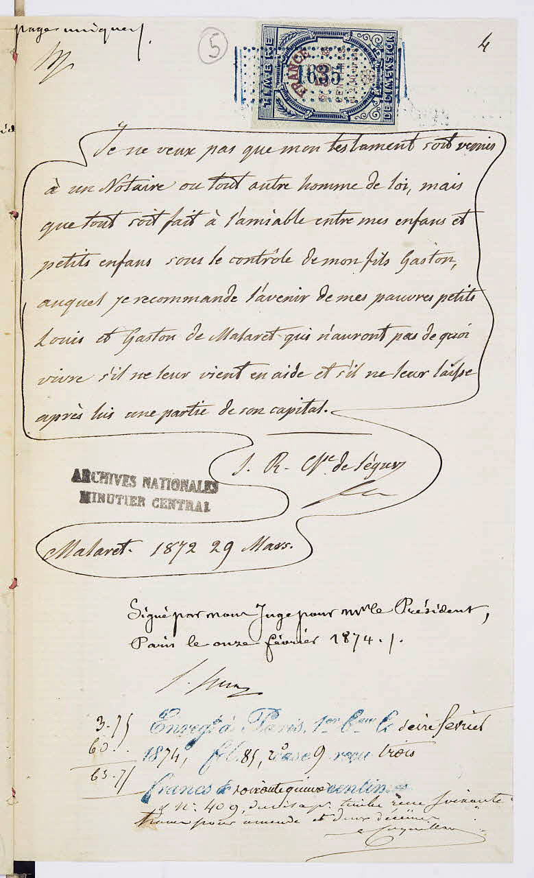 Testament olographe de Sophie Rostopchine, comtesse de Ségur, signé le 29 mars 1872 et enregistré en 1874.